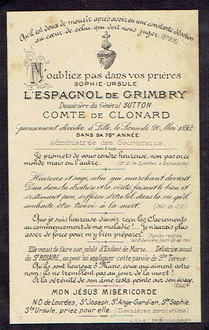 Faire-part de décès de Sophie Ursule Lespagnol de Grimbry.